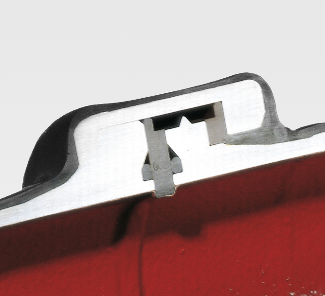 Detail Isolierstück Ringfunkenstrecke: Schnittmodell